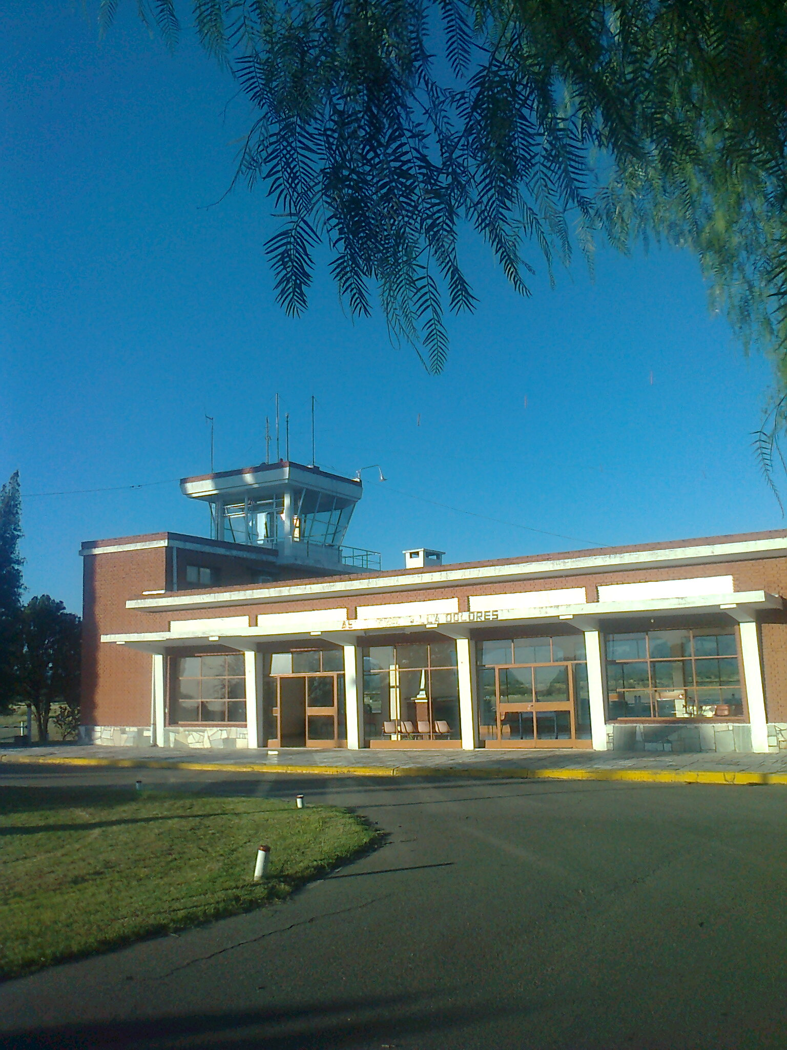 Foto del aeropuerto de la ciudad de Villa Dolores